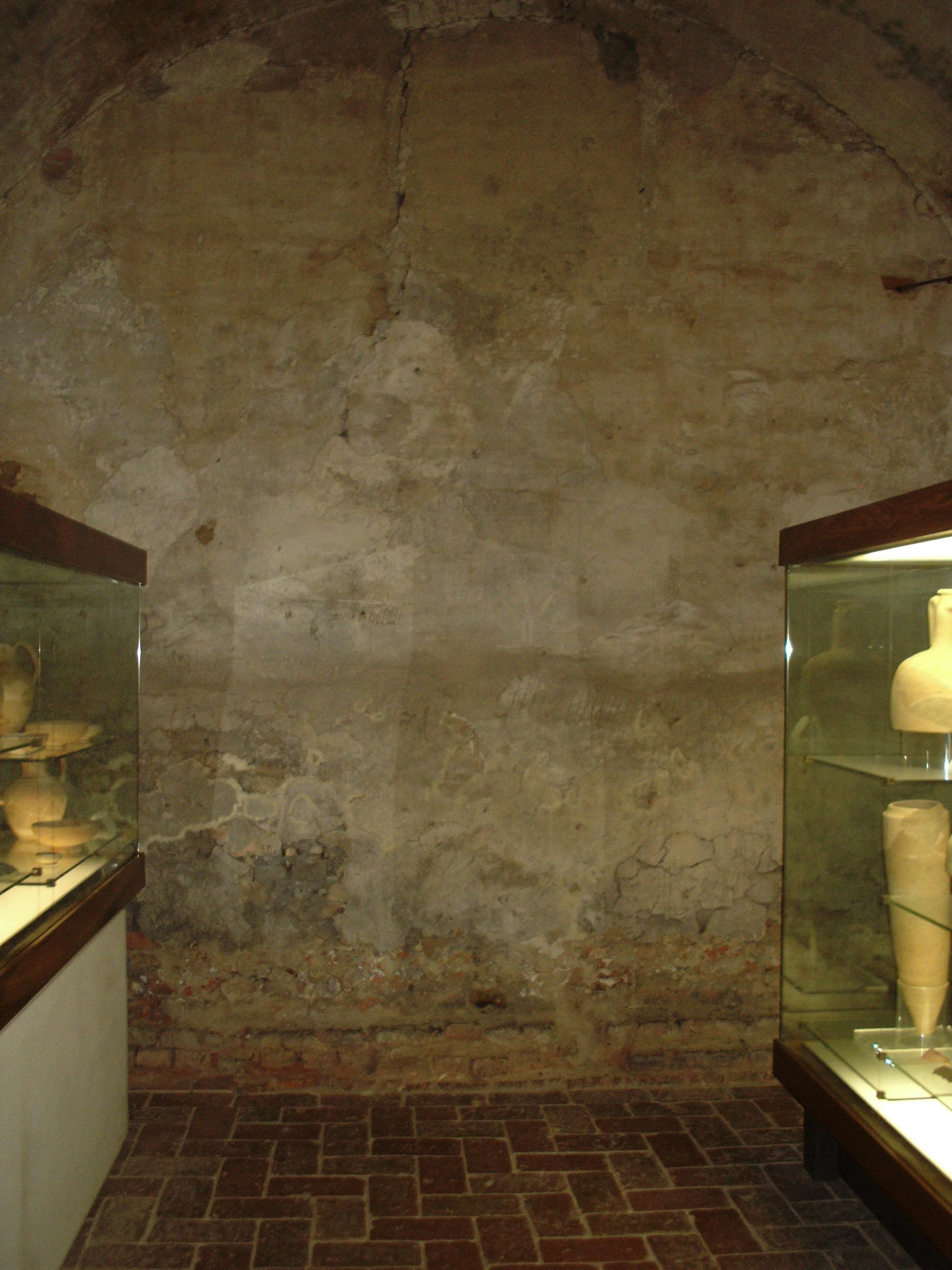 Certaldo, Palazzo Pretorio, Carceri civili